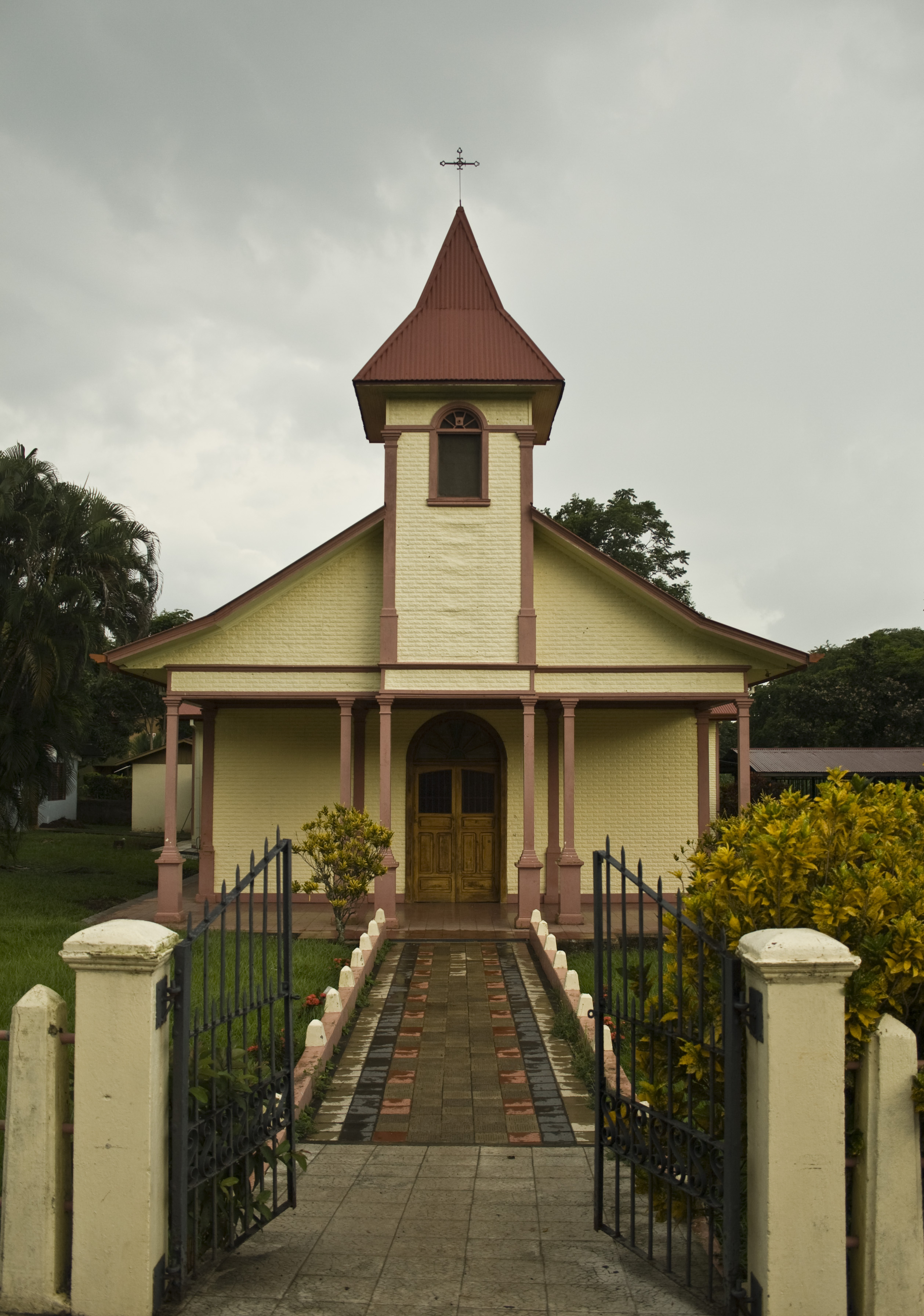 Iglesia católica de San Isidro. Cantón de Montes de Oro. Provincia de Puntarenas. Costa Rica.